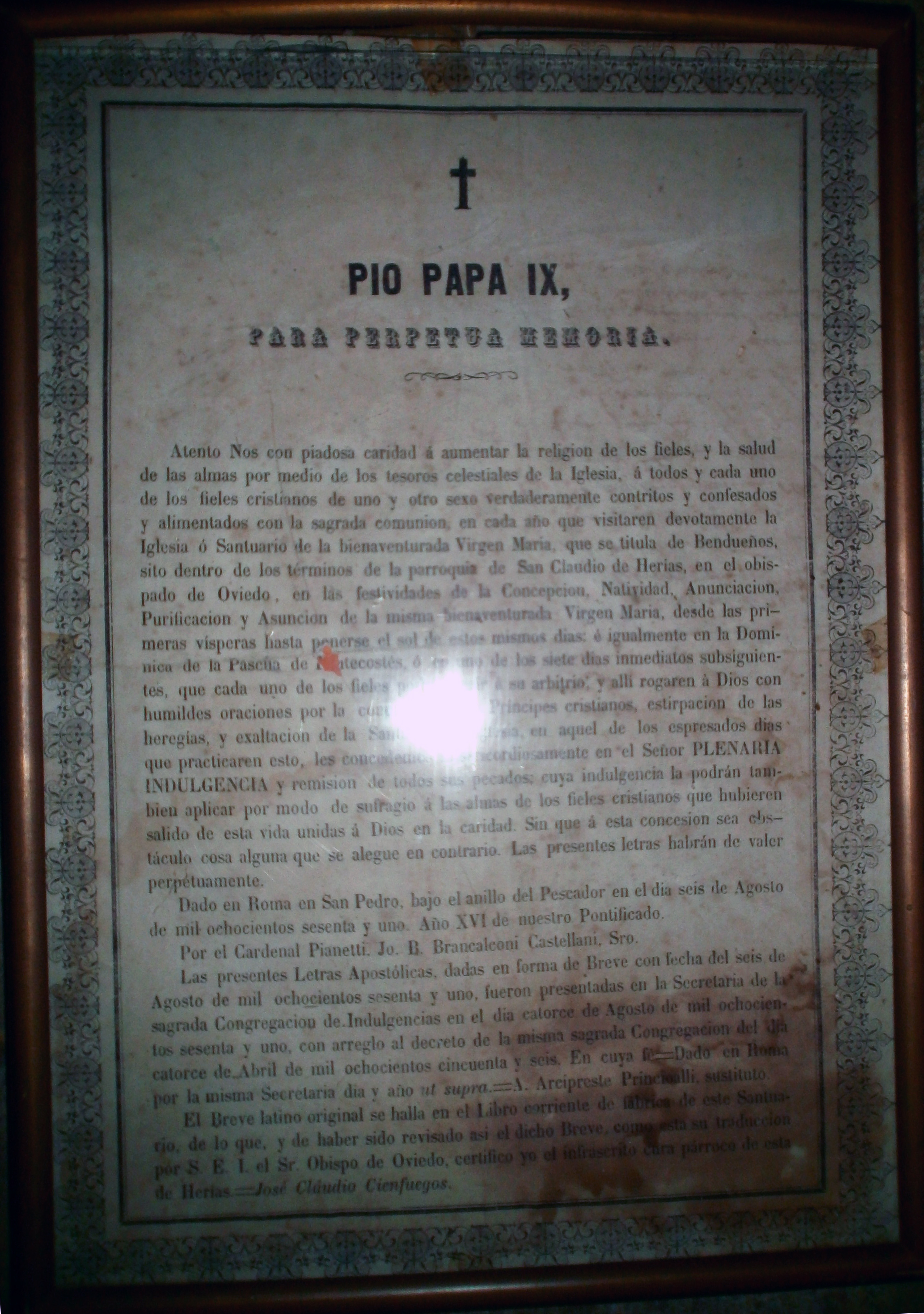 Facsimil de la Indulgencia Plenaria concedida por el Papa Pio IX en el muro lateral derecho de la nave